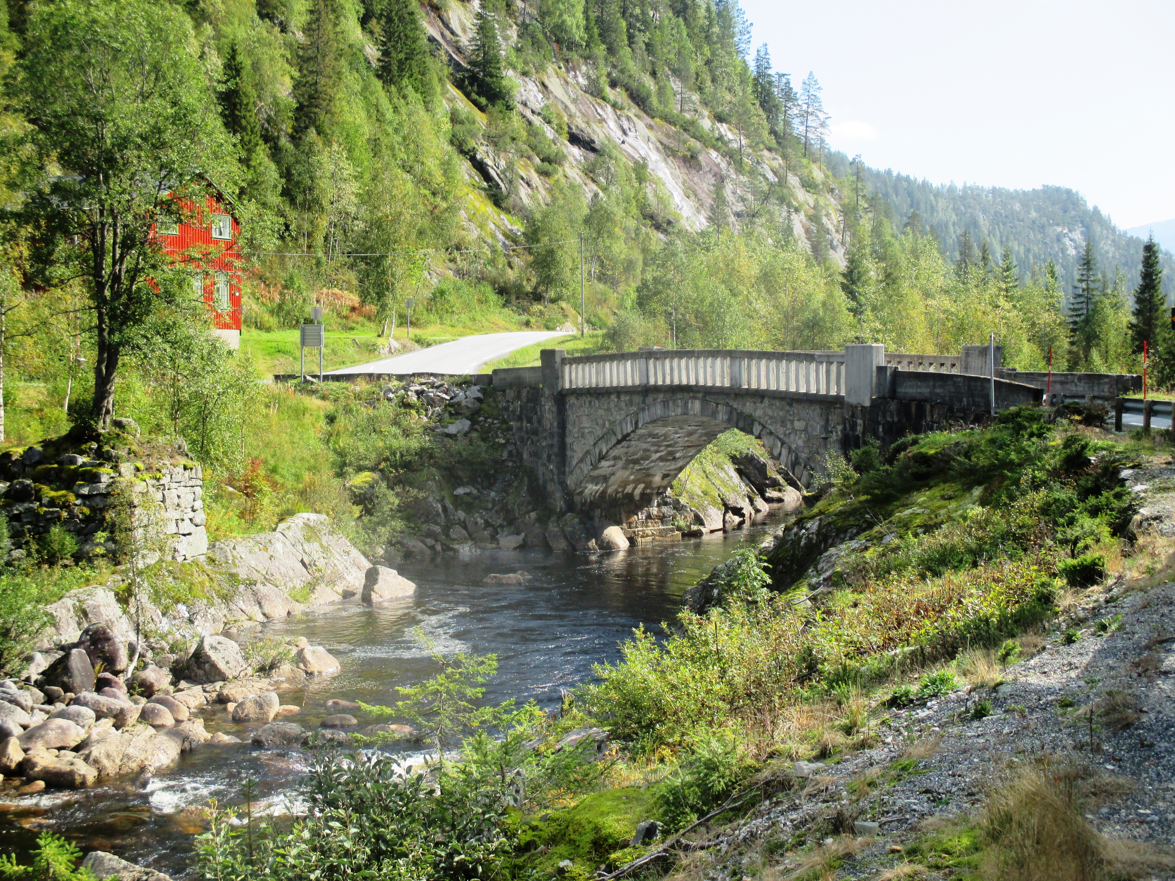 Fylkesvei 503 krysser Åmotsdalsåi på denne broen.